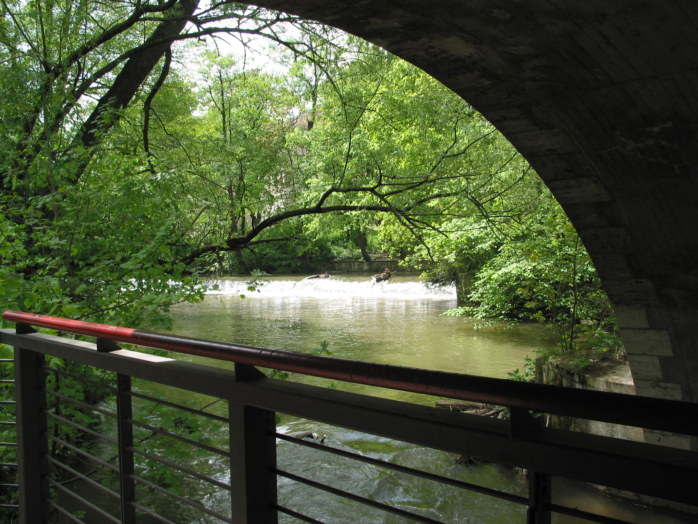 Blick vom Steg unter der Kegelbrücke auf das Ilm-Wehr der ehemaligen Burgmühle in Weimar.